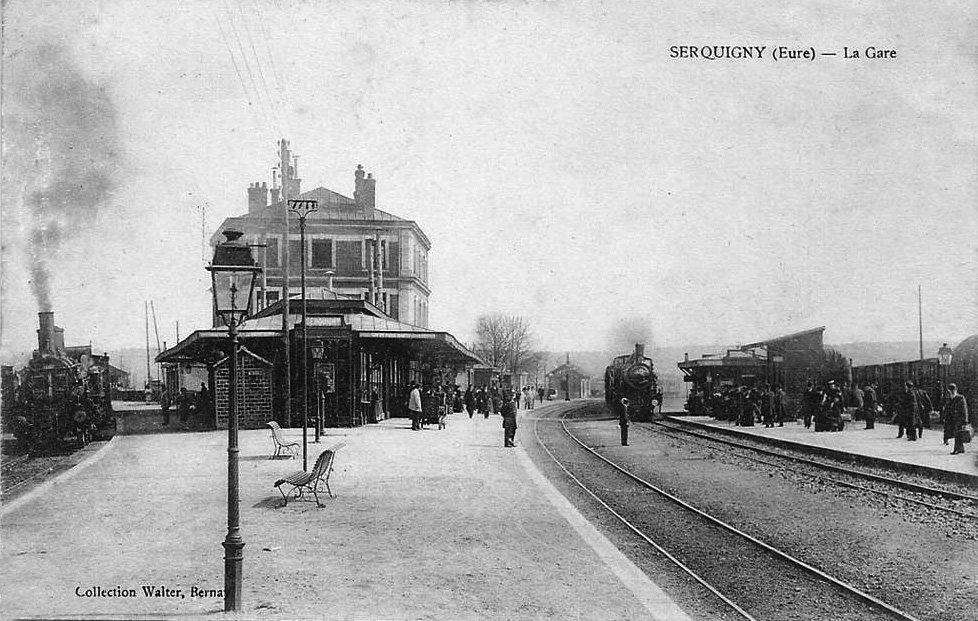 L'intérieur de la gare de Serquigny vers 1900.